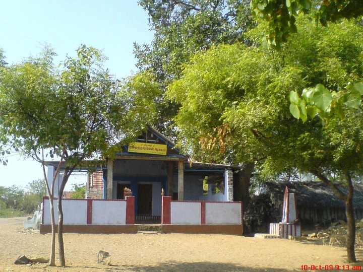 udhayathoor keloor